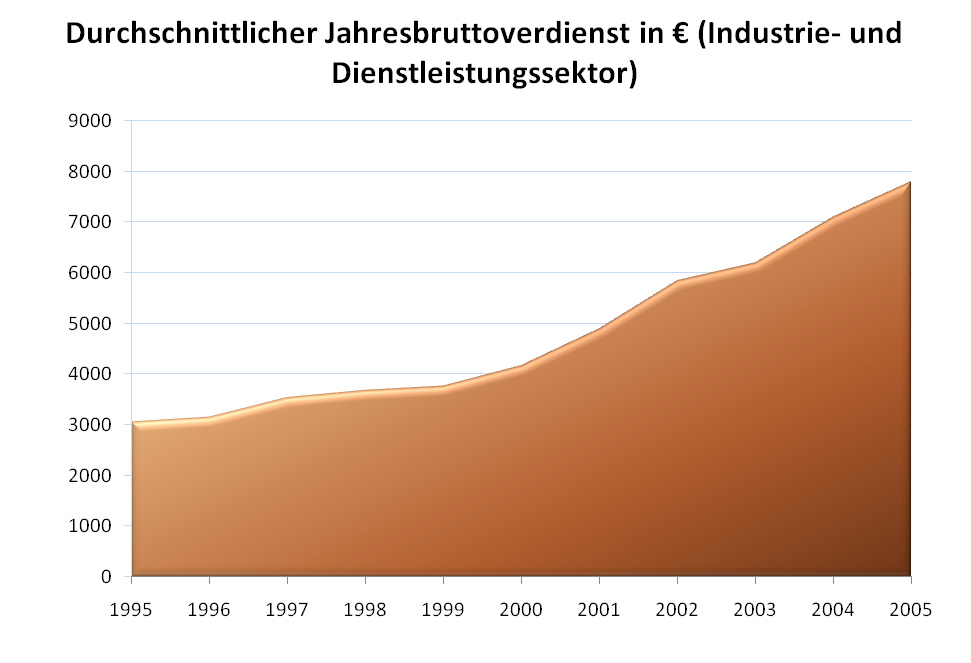 Jahresbruttoverdienst - Ungarn - Dienstleistungs- und Industriesektor